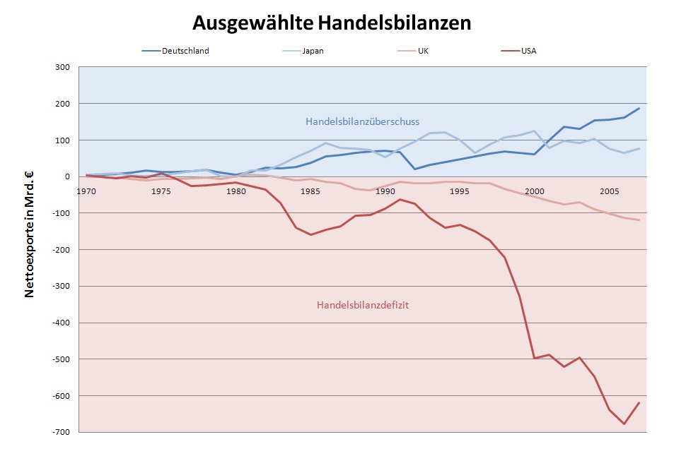 Die Graphik zeigt die Handelsbilanzen der Länder Deutschland, Japan, USA und Vereinigtes Königreich seit 1960. Japan und Deutschland weisen regelmäßig einen Handelsbilanzüberschuss aus, während die USA und das Vereinigte Königreich seit Jahrzehnten ein Handelsbilanzdefizit ausweisen.